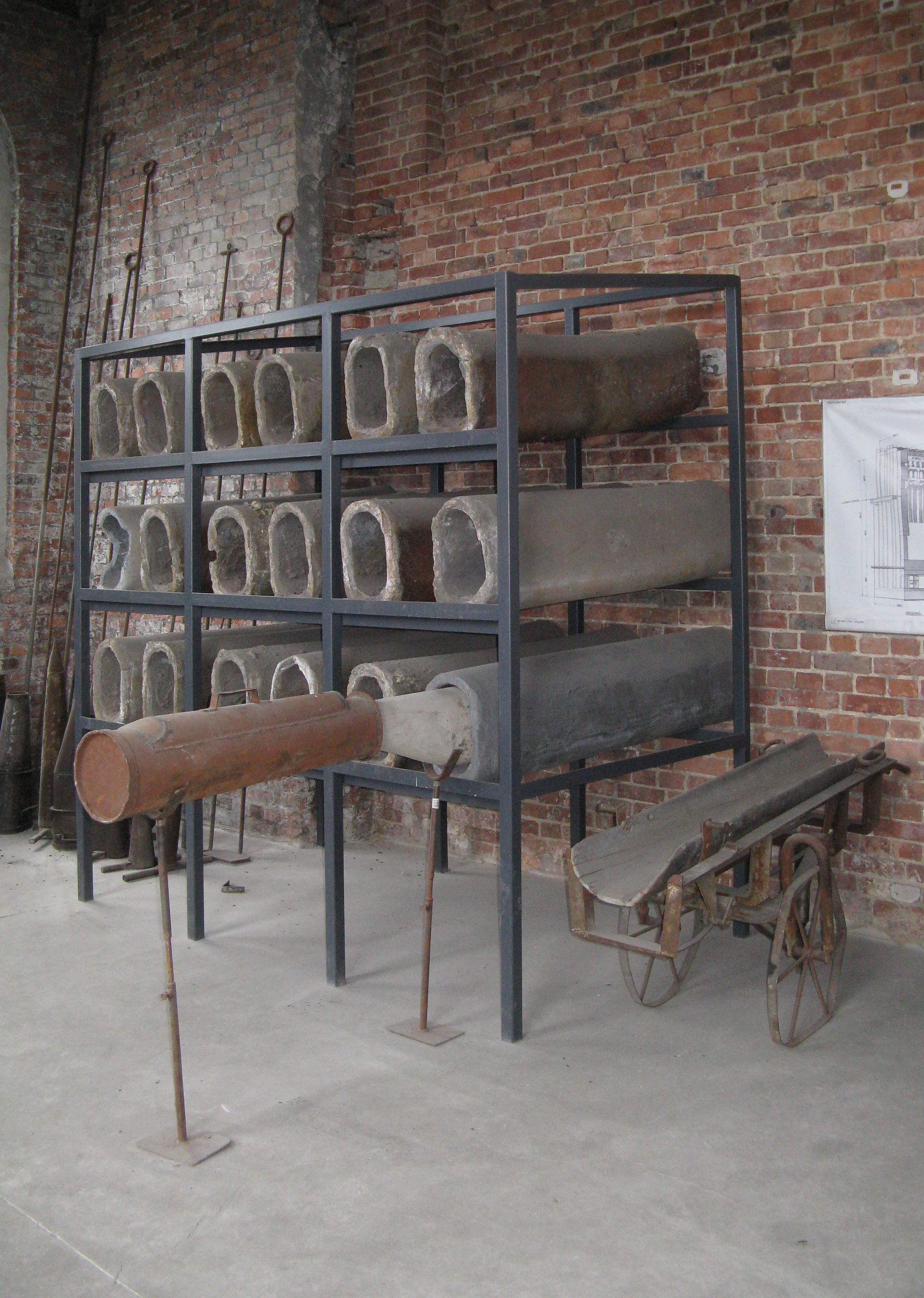 Mufle pieca destylacyjnego cynku na ekspozycji Muzeum Hutnictwa Cynku Walcownia w Katowicach, przy jednej z nich nadstawka na płynny cynk i balon do wychwytywania pyłu cynkowego.